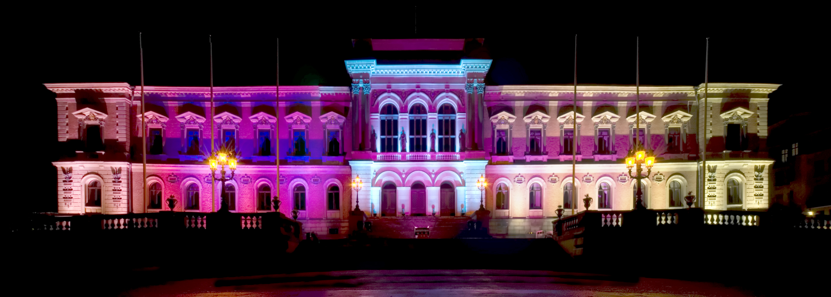 Universitetshuset, Uppsala, during the light festival Allt ljus på Uppsala in november 2008.